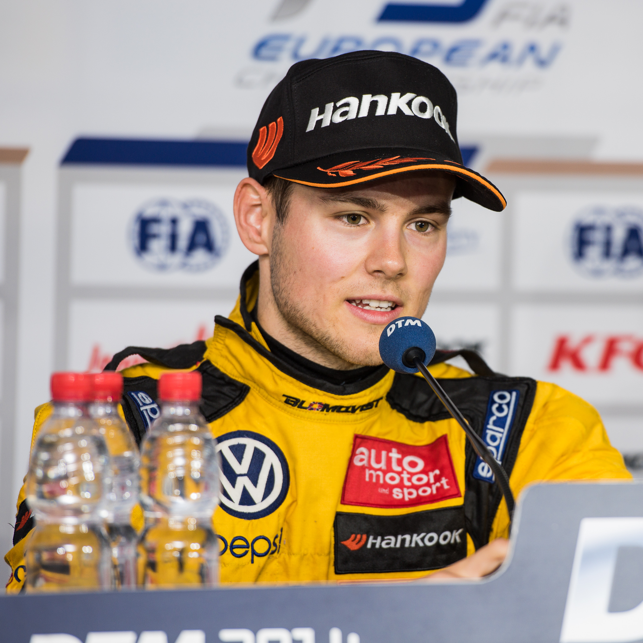 DTM,Deutsche Tourenwagen Masters,F3 FIA European Championship,FIA Formel 3 Europameisterschaft,Hockenheimring,Jagonya Ayam with Carlin,Motorsport,Pressekonferenz,Siegerehrung,Tom Blomqvist